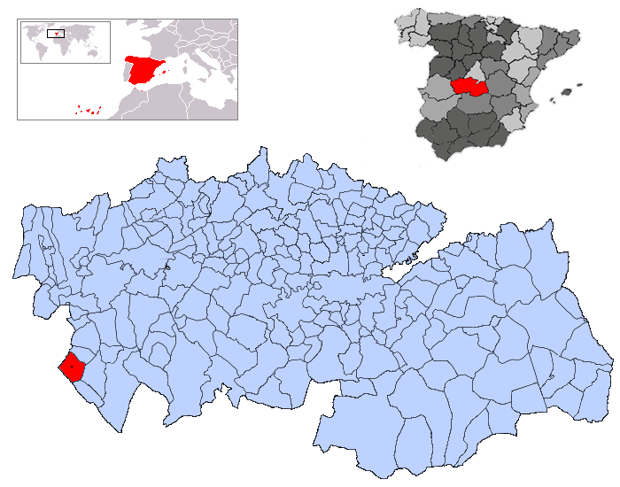 Mohedas de la Jara en la provincia de Toledo